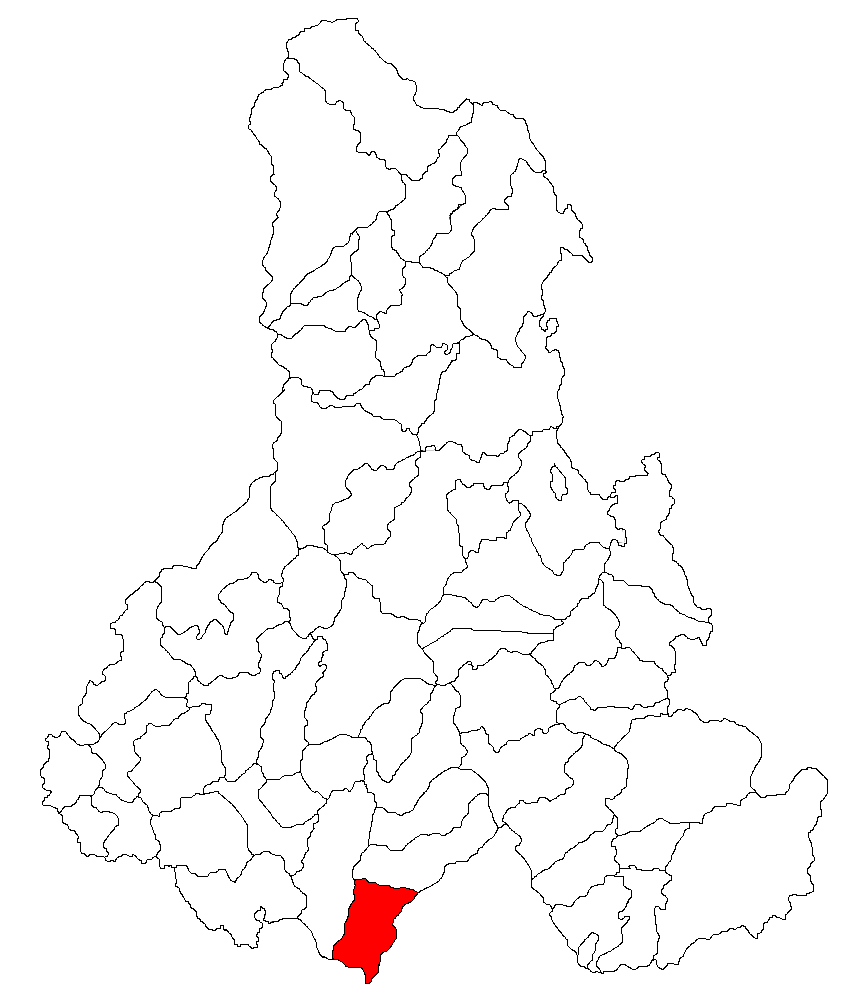 Categorie:Hărţi ale judeţului Harghita Contents 1 Licensing 2 Sursă 3 Licensing 4 Original upload log Licensing Sursă ro::Imagine:Harta_jud_Harghita.png